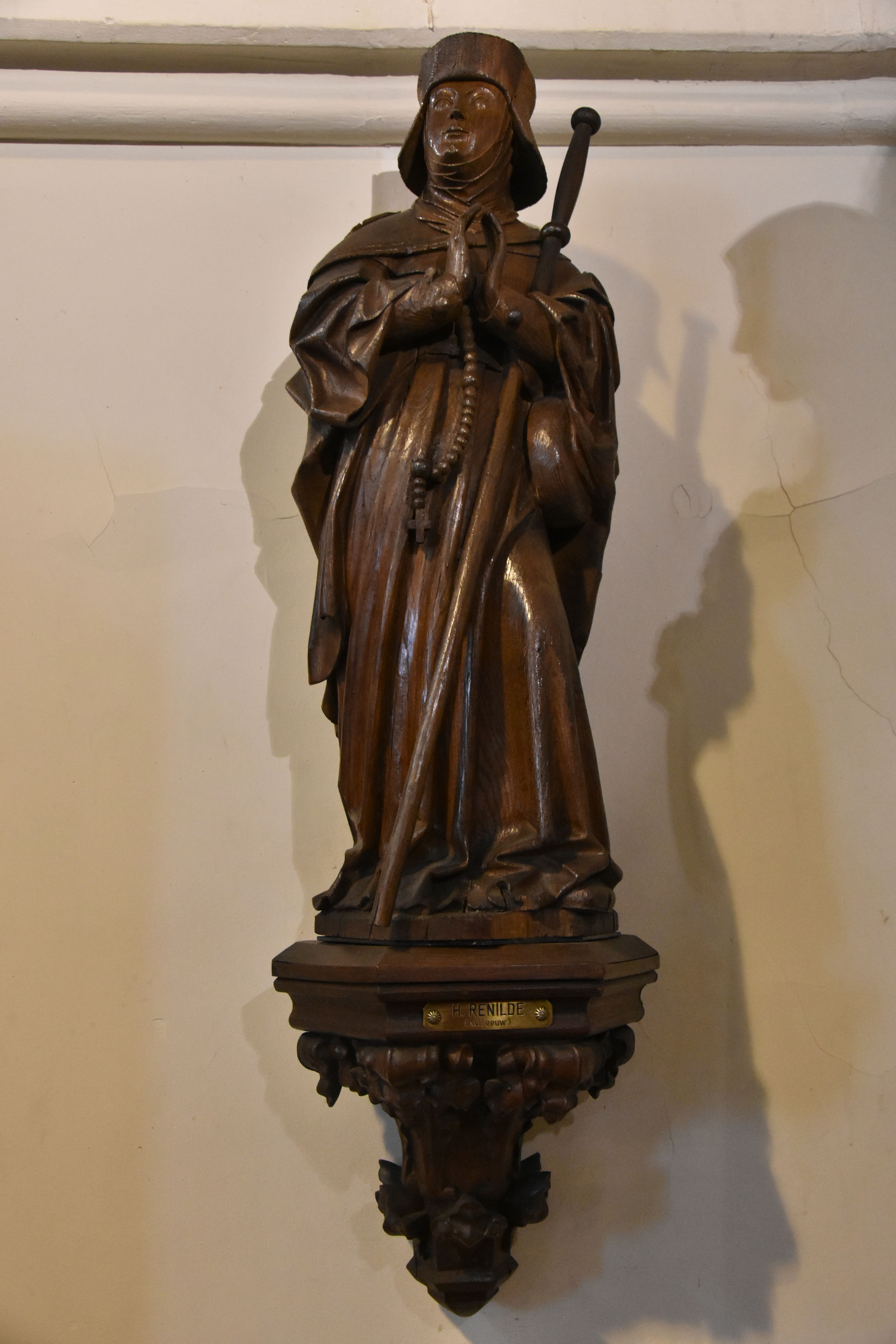 Meester van Elsloo (1520-1530) Heilige Renildis van Saintes Sint-Lambertuskerk (Neeroeteren) 8-09-2019 This photo of movable heritage has been taken in the Flemish Region